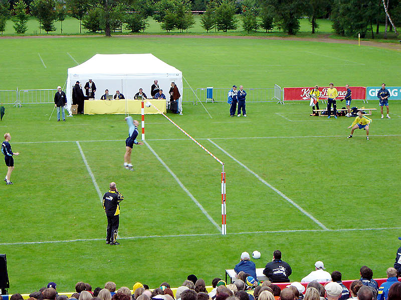 Faustball Angriff durch Niels Pannewig (Deutschland), World Games 2005 Duisburg, im Vorrundenspiel Deutschland-Brasilien